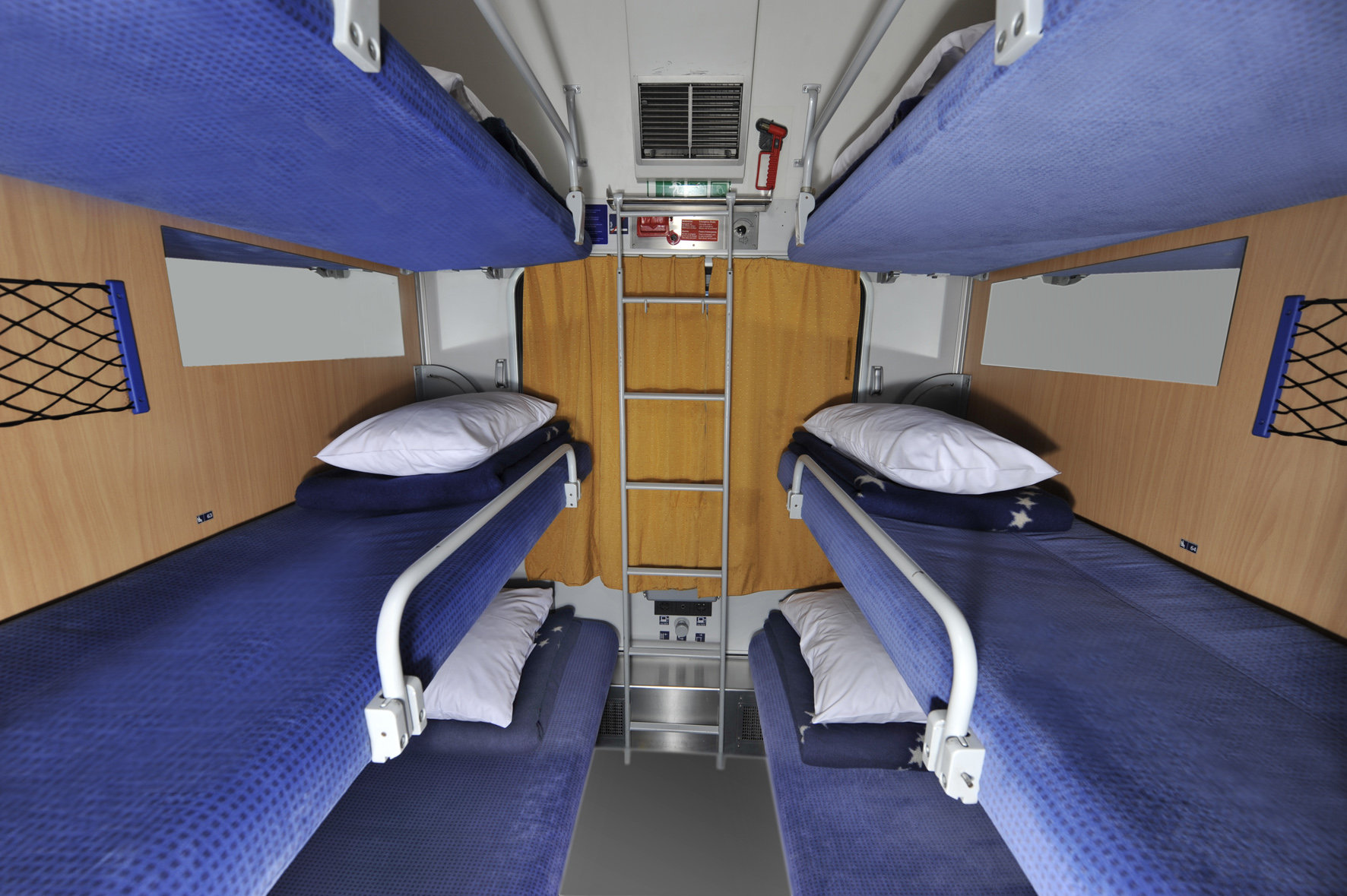 Liegewagen City Night Line (6er Belegung)